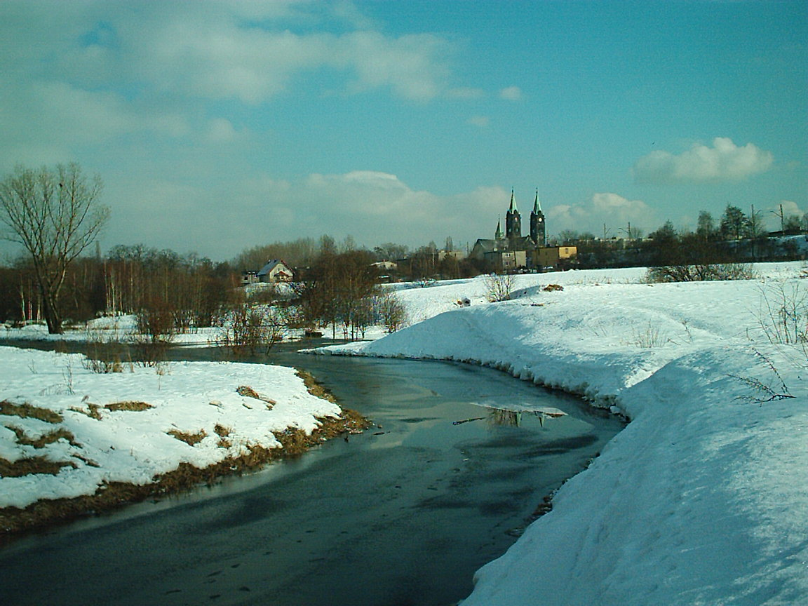 Panorama Kochłowic od rzeki Kochłówki w Rudzie Śląskiej.